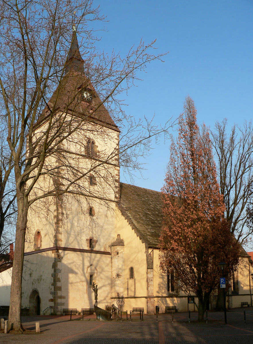 St.-Marien-Kirche in Hessisch Oldendorf